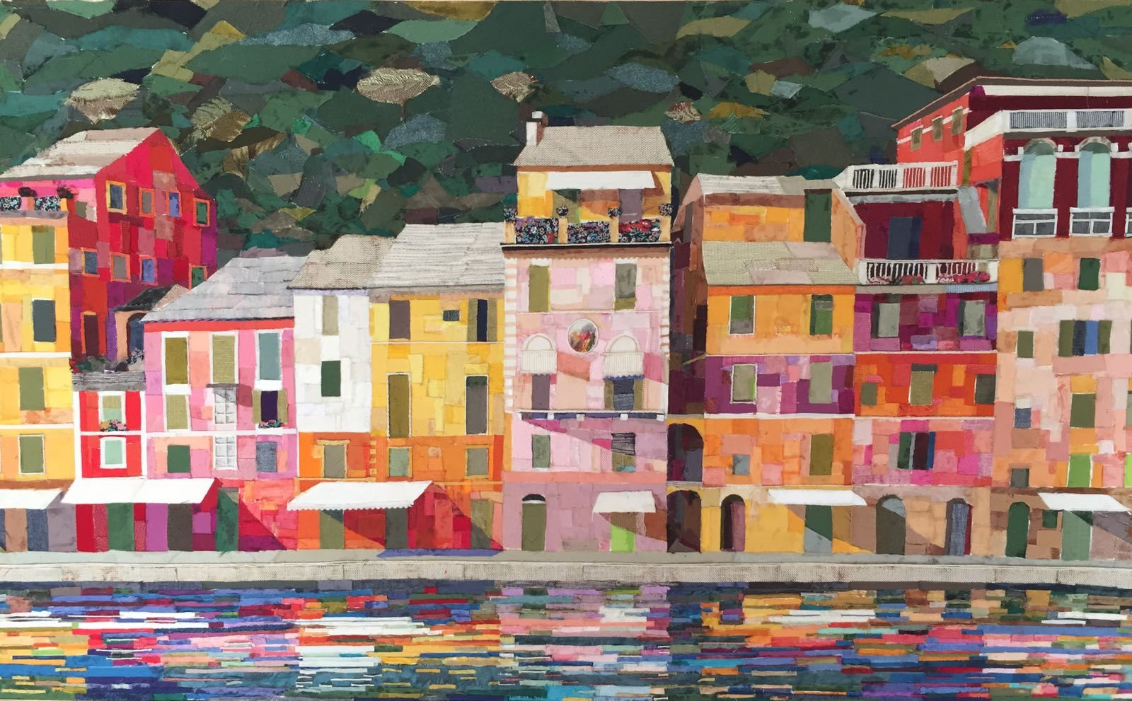 Vista di Portofino, opera realizzata con tarsie di seta